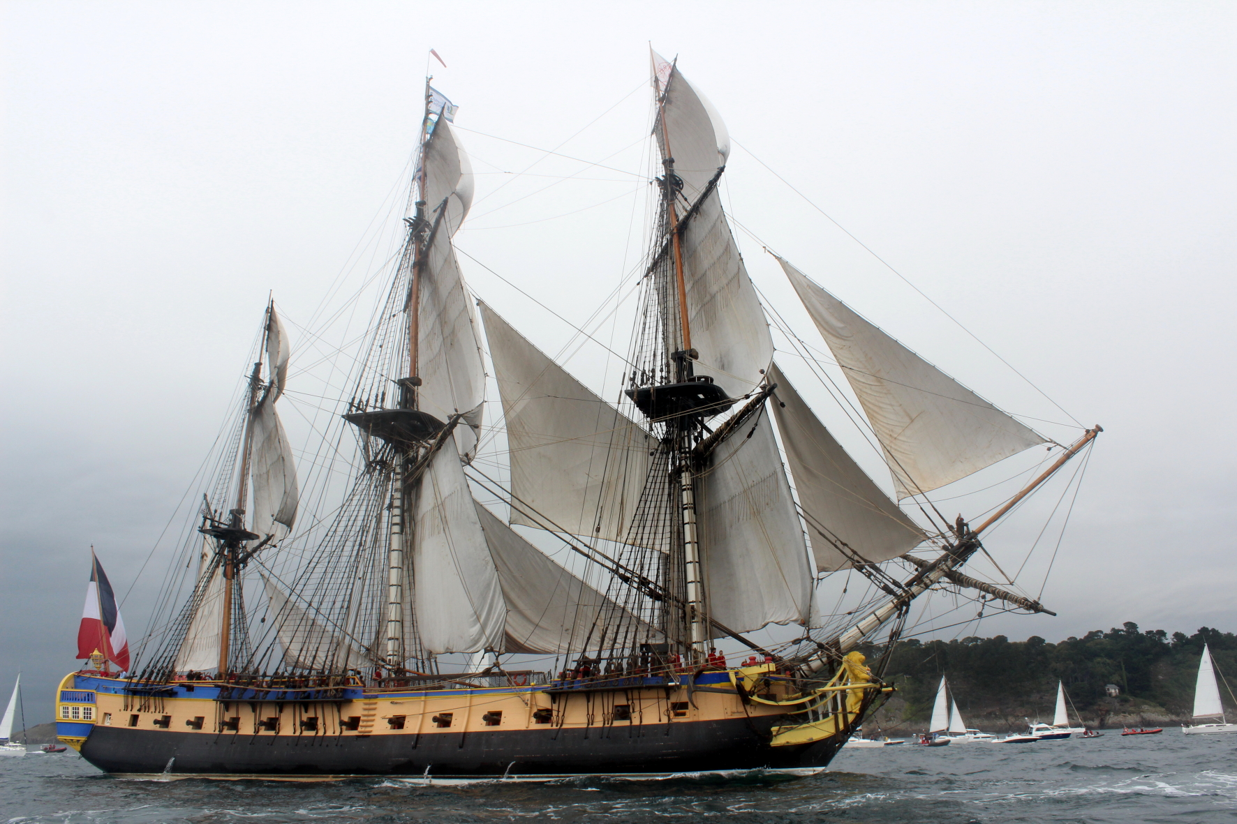 Arrivée de l'Hermione à Brest après sa traversée de l'Atlantique Nord depuis Saint Pierre et Miquelon, accompagnée par les bateaux du patrimoine de la rade.